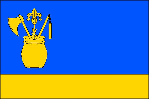 Vlajka obce Horní Tošanovice